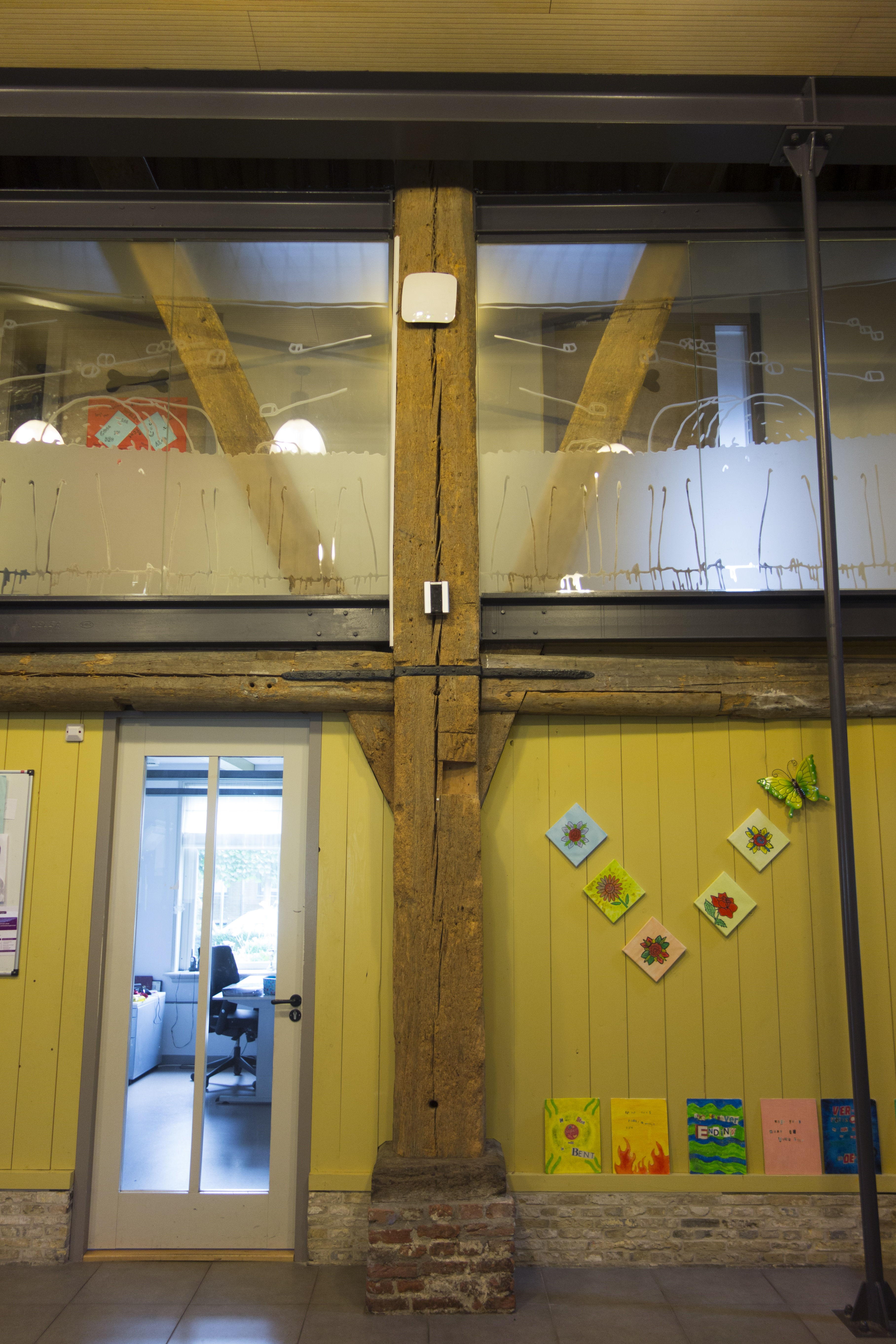 Een van de houten poten van een van de twee vierkanten in het stolpgedeelte van de Schuilhoeve in Grootebroek.